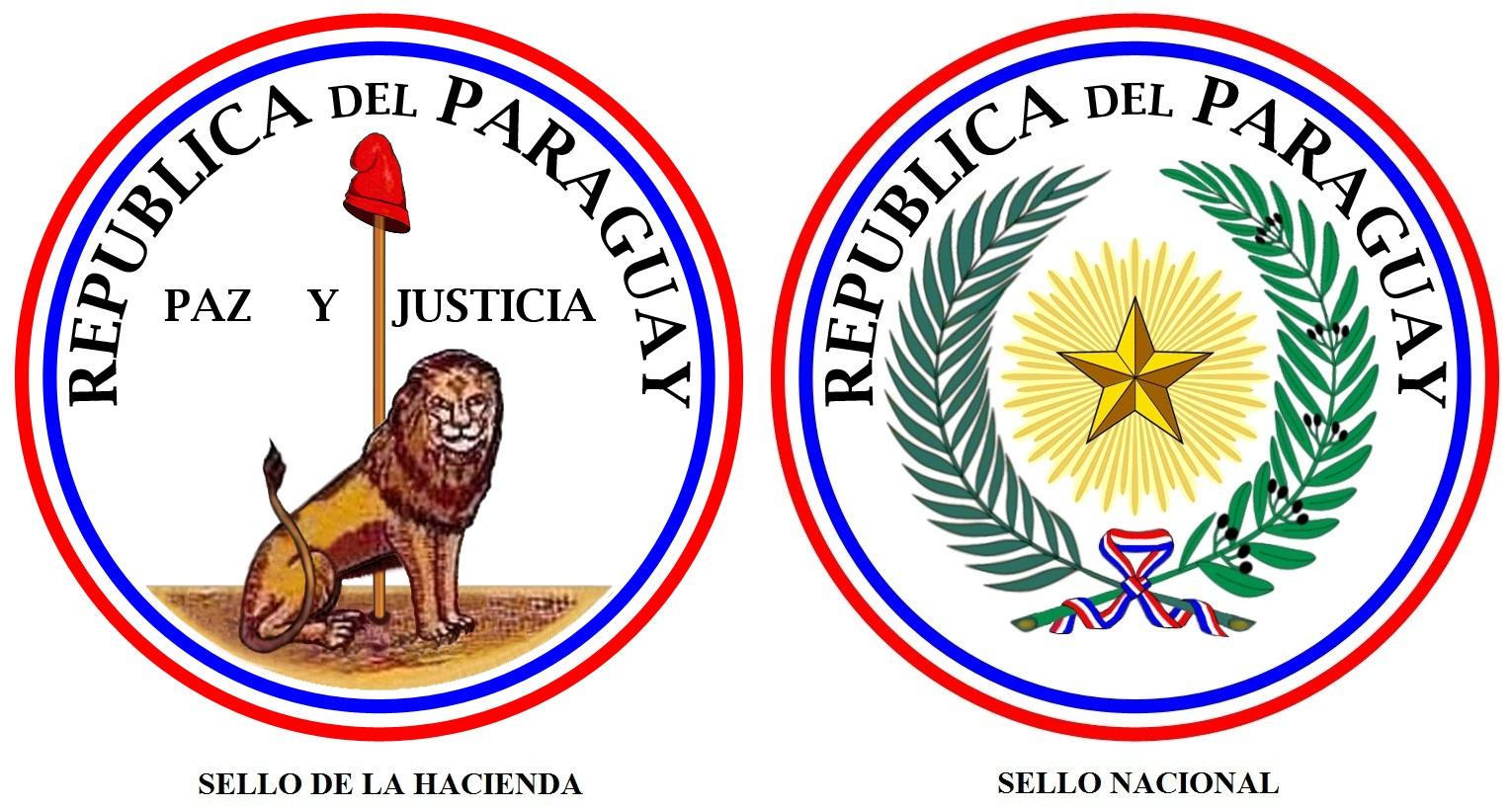 Escudo Nacional Paraguayo, formado por los sellos nacional y de hacienda.